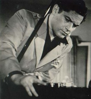 Lautaro Murúa. Demasiado Jóvenes (1958)